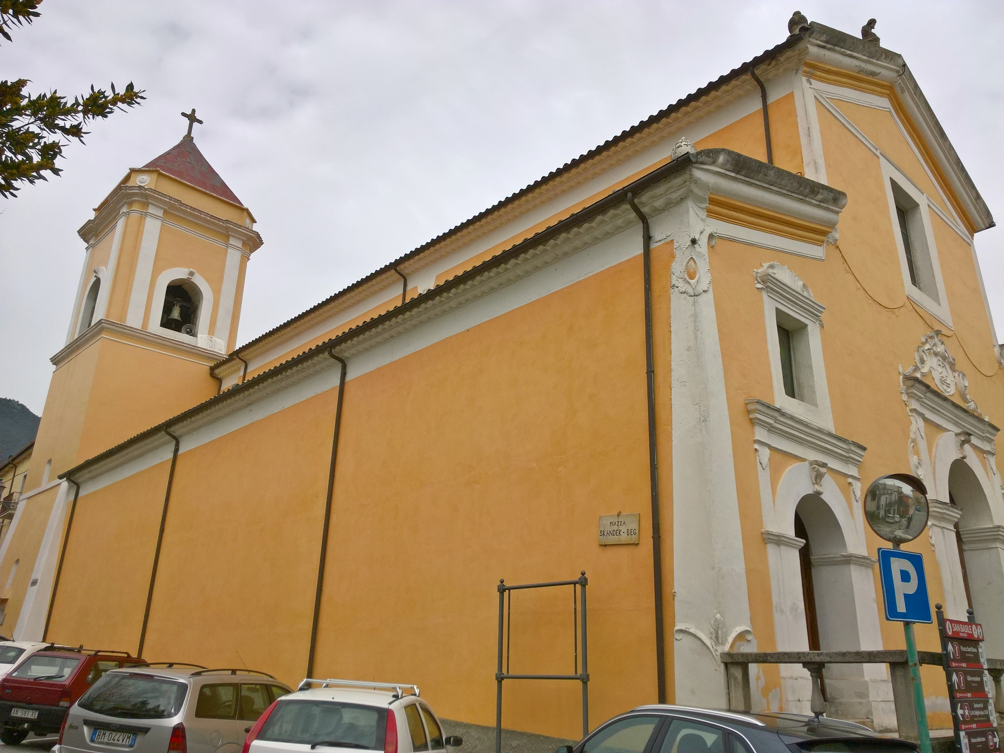 Chiesa di San Giovanni Battista